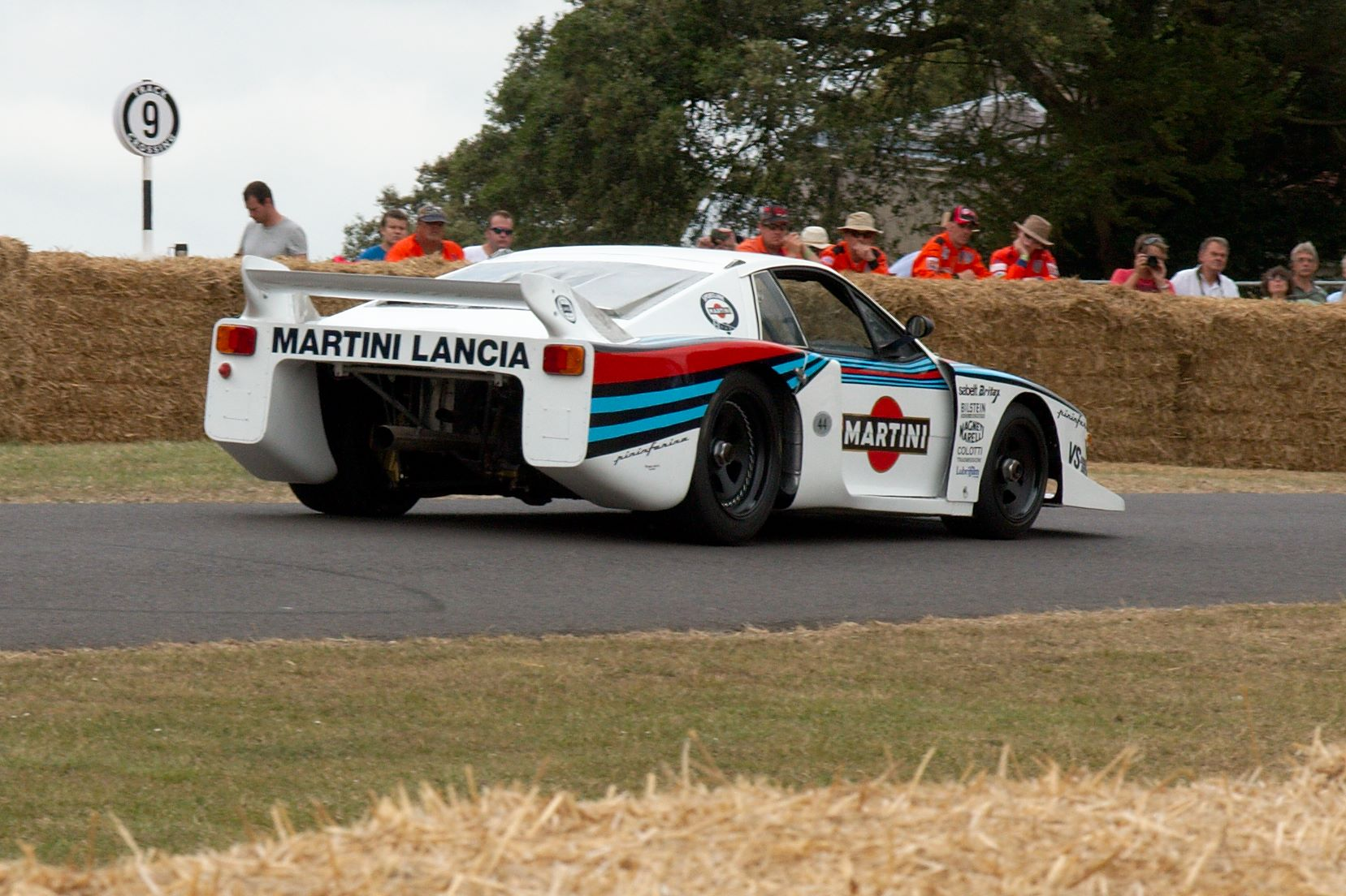 Lancia Beta Monte Carlo Turbo